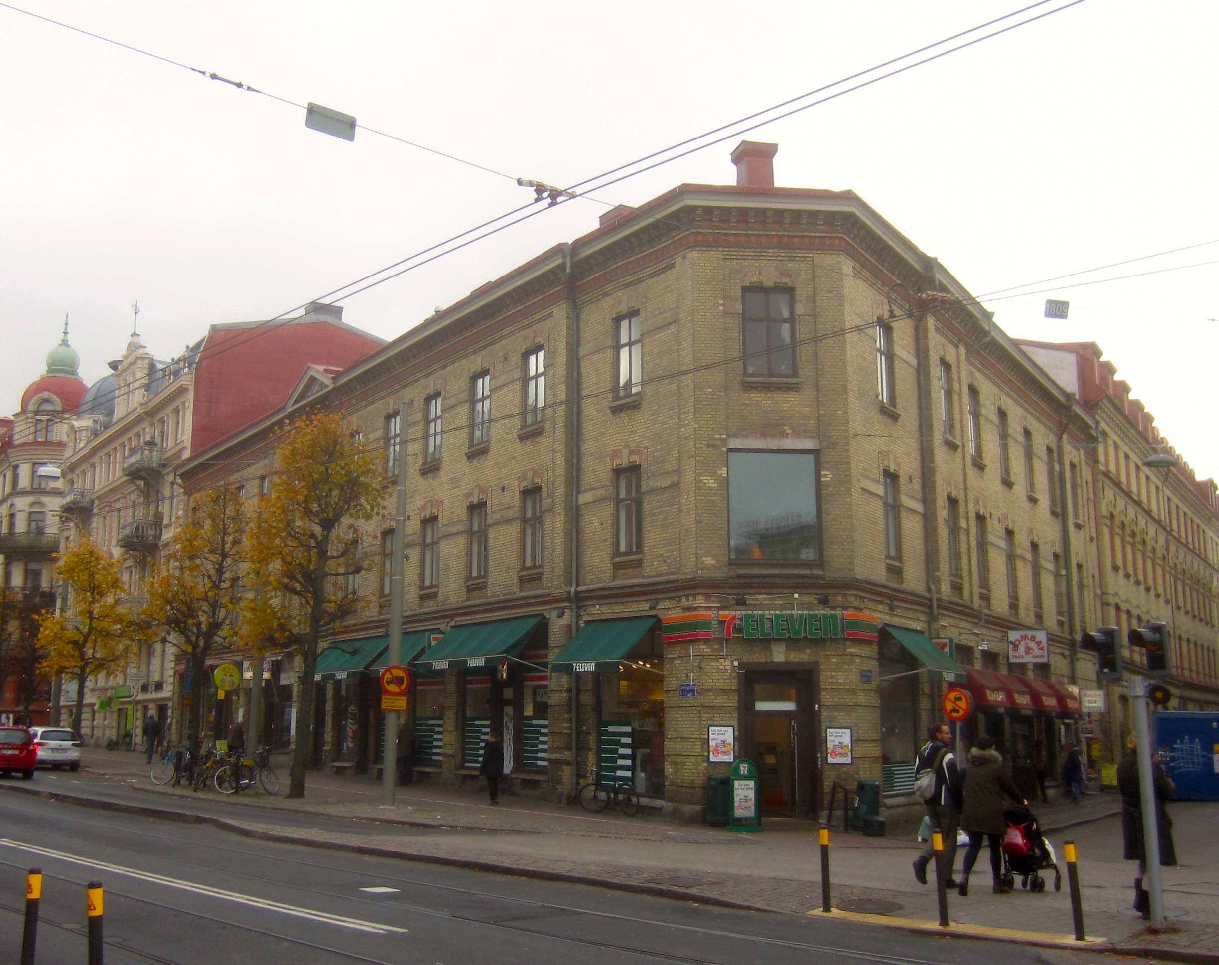 Linnégatan 1, Göteborg. Fastigheten MASTHUGGET 8:12 i kvarteret Skutan är byggnadsminne sedan 2001.